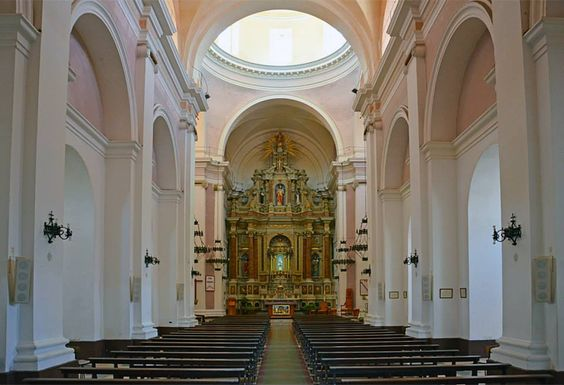 Inneres der Kathedrale von Maldonado, Uruguay